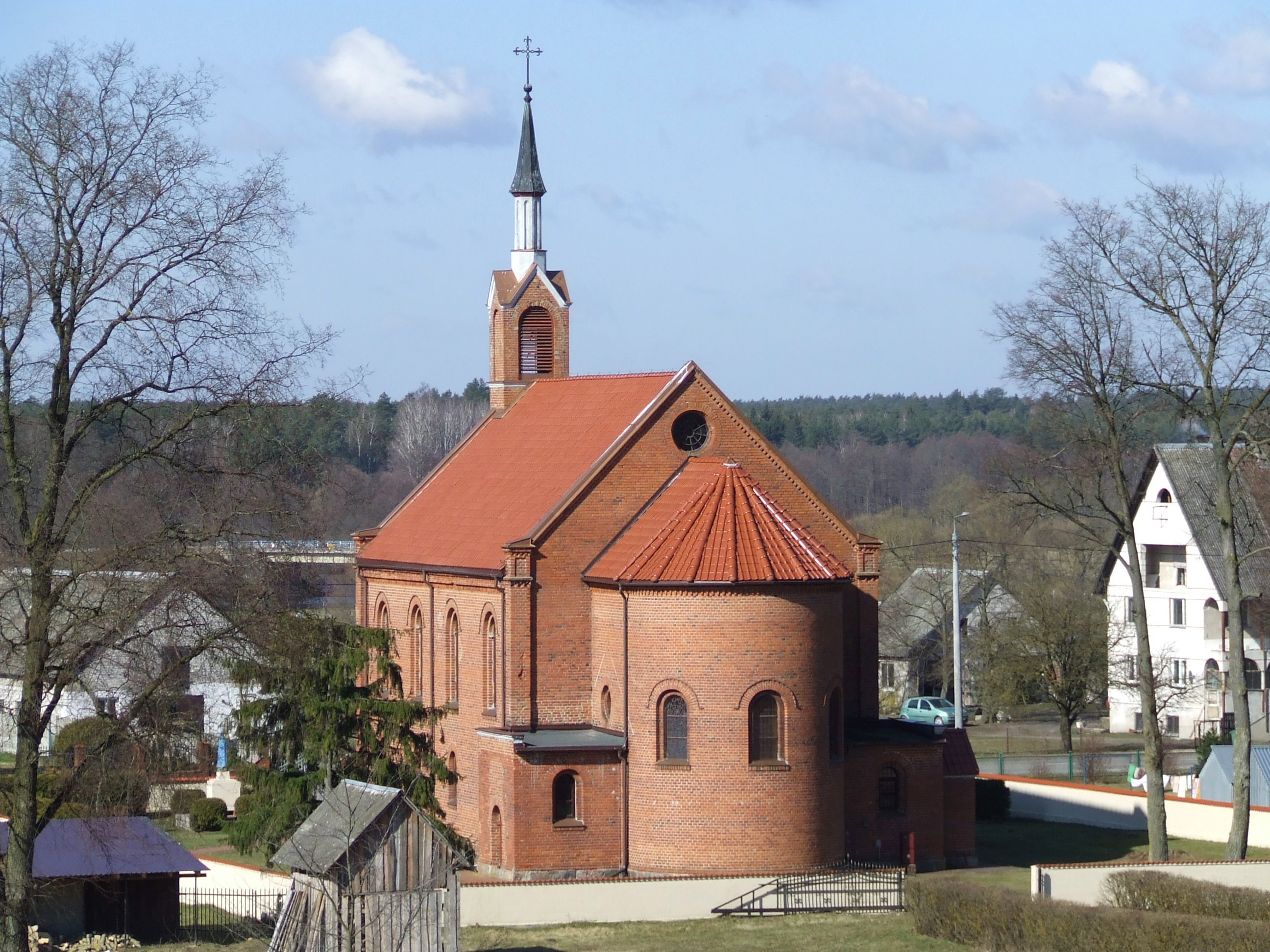 Kościół w Jeżach (powiat piski)